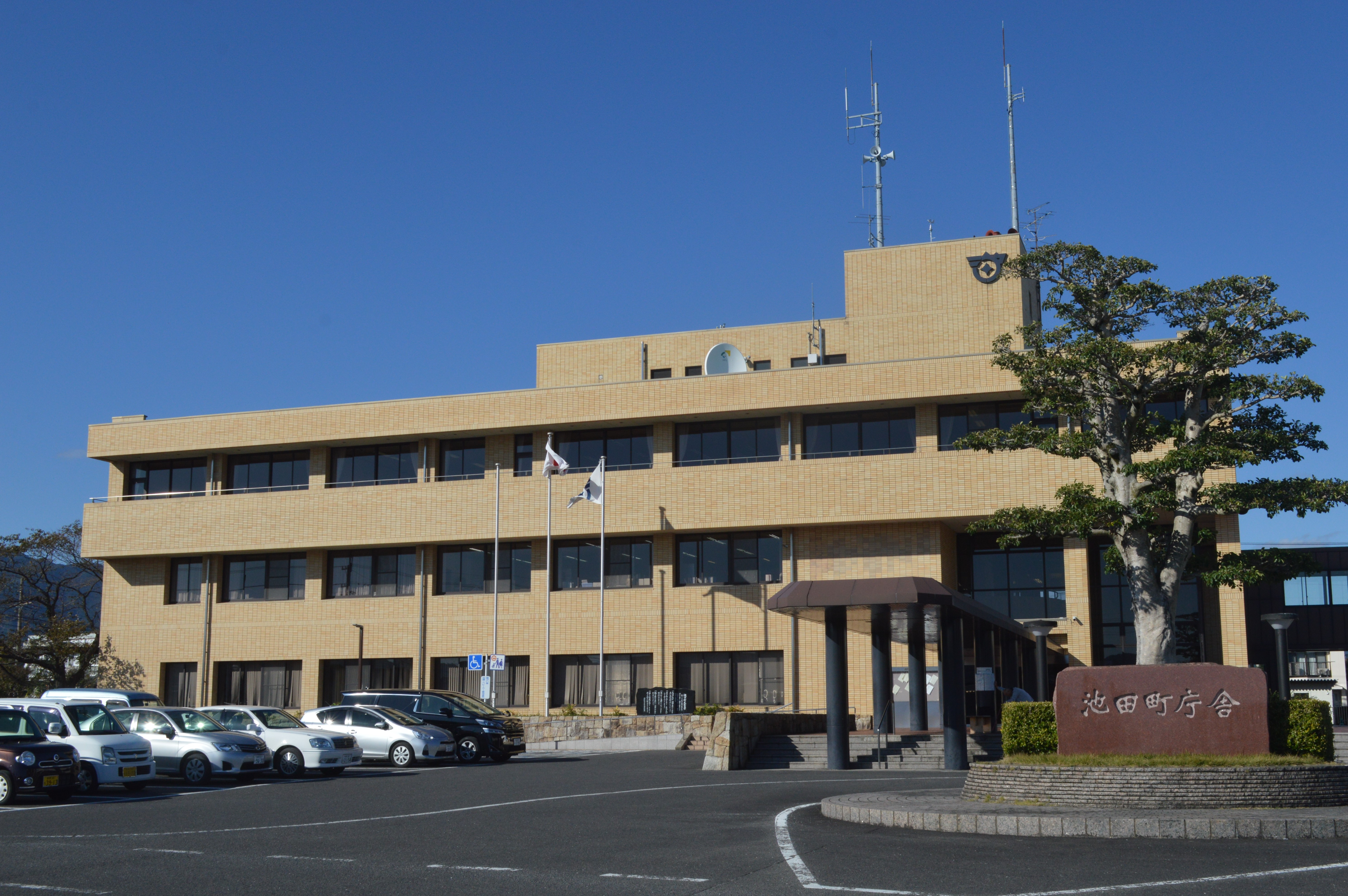 岐阜県揖斐郡池田町にある池田町役場。